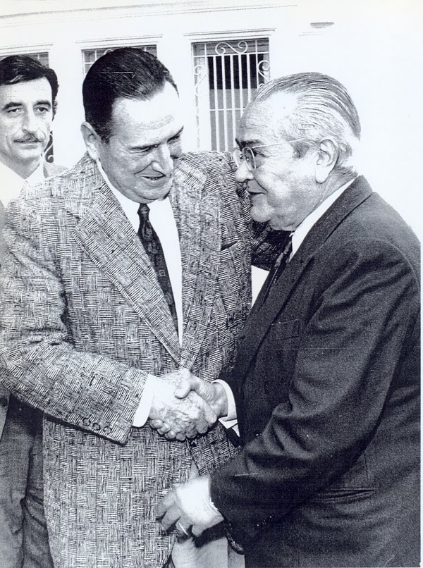 Es la histórica foto del líder Juan Domingo Perón saludando al líder radical Ricardo Balbín.